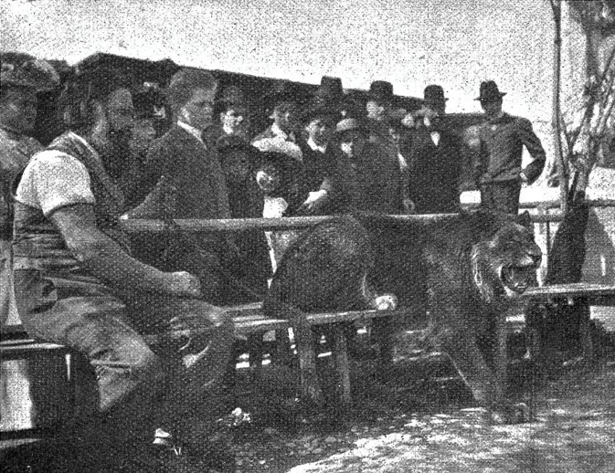 Urs (Ursus) Eggenschwyler (1849–1923) Bildhauer, Zeichner mit seinem Zürcher Löwe (sZüri-Leuli). Fotografie 1903 von Schulthess-Schoch, Zürich